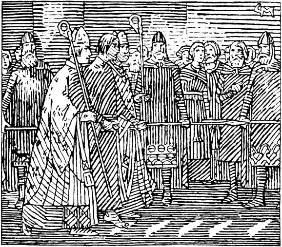 Gerhard Munthe: Illustration for Magnussønnens saga. Snorre 1899-edition. nn: «Harald Gille går over gloande jarn.» nb: «Harald Gilles jernprøve»